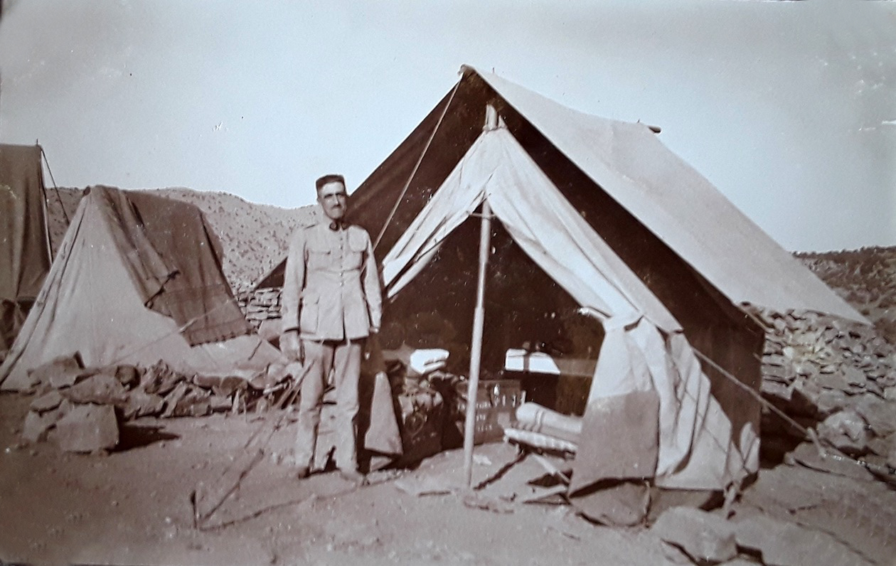 Albert Chemin devant une tente pendant la campagne du Maroc, 26 juillet 1932, Bou Souatine.